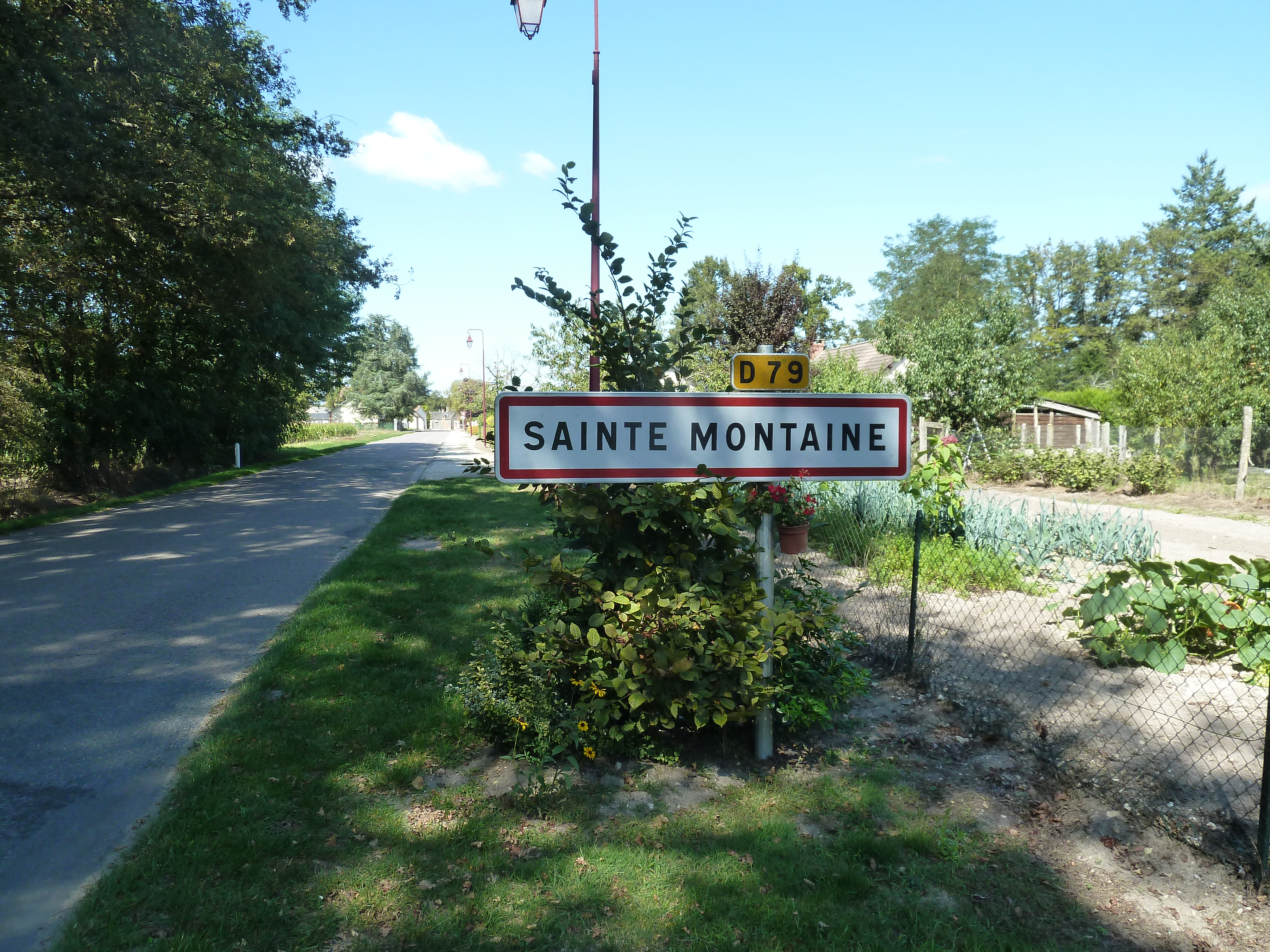 Sainte-Montaine département du Cher).- Région Centre-Val_de_Loire France